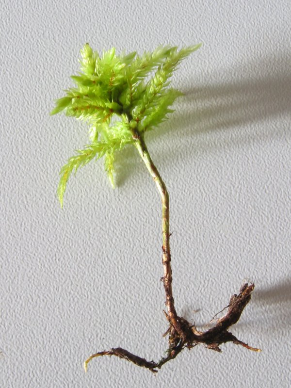 Bäumchen-Leitermoors (Climacium dendroides), Habitus, Rostock